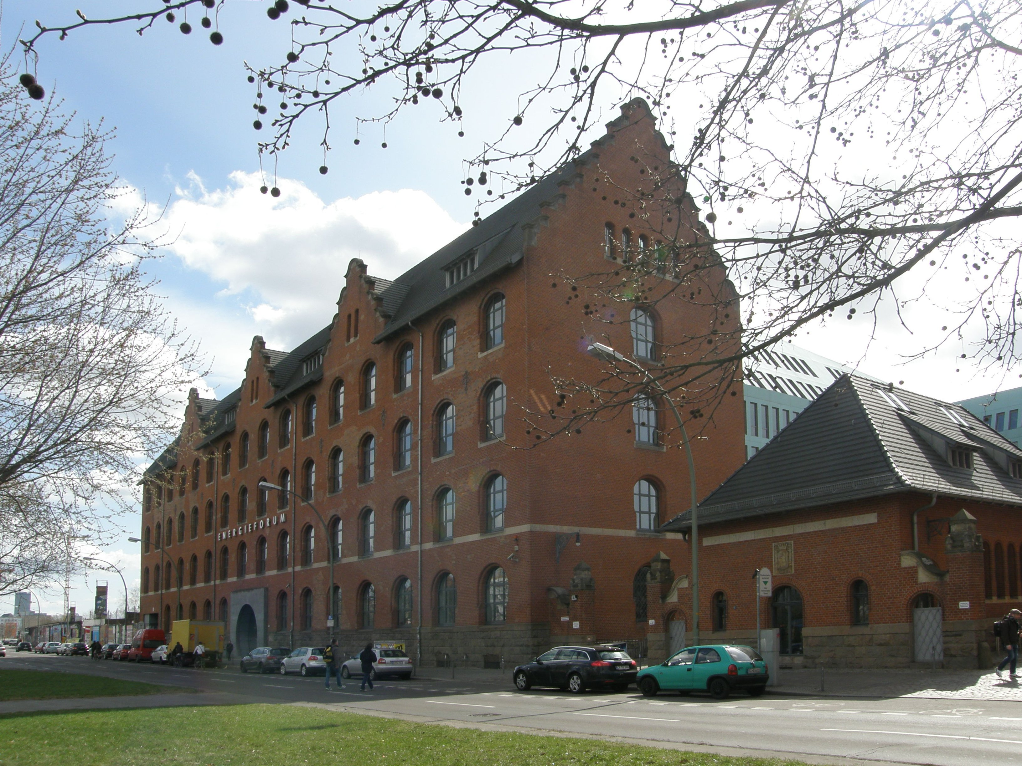 Berlin-Friedrichshain, Stralauer Platz; von links: Maganzin, Torhaus